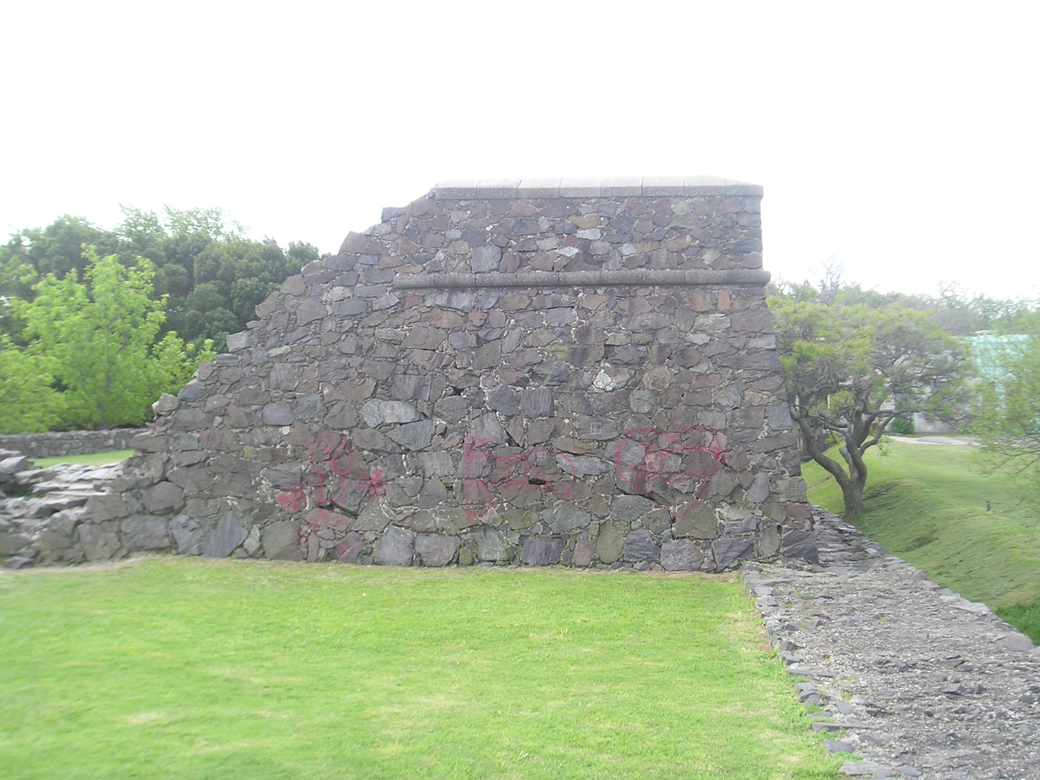 Colonia del Sacramento, Uruguay - Bastion of San Miguel